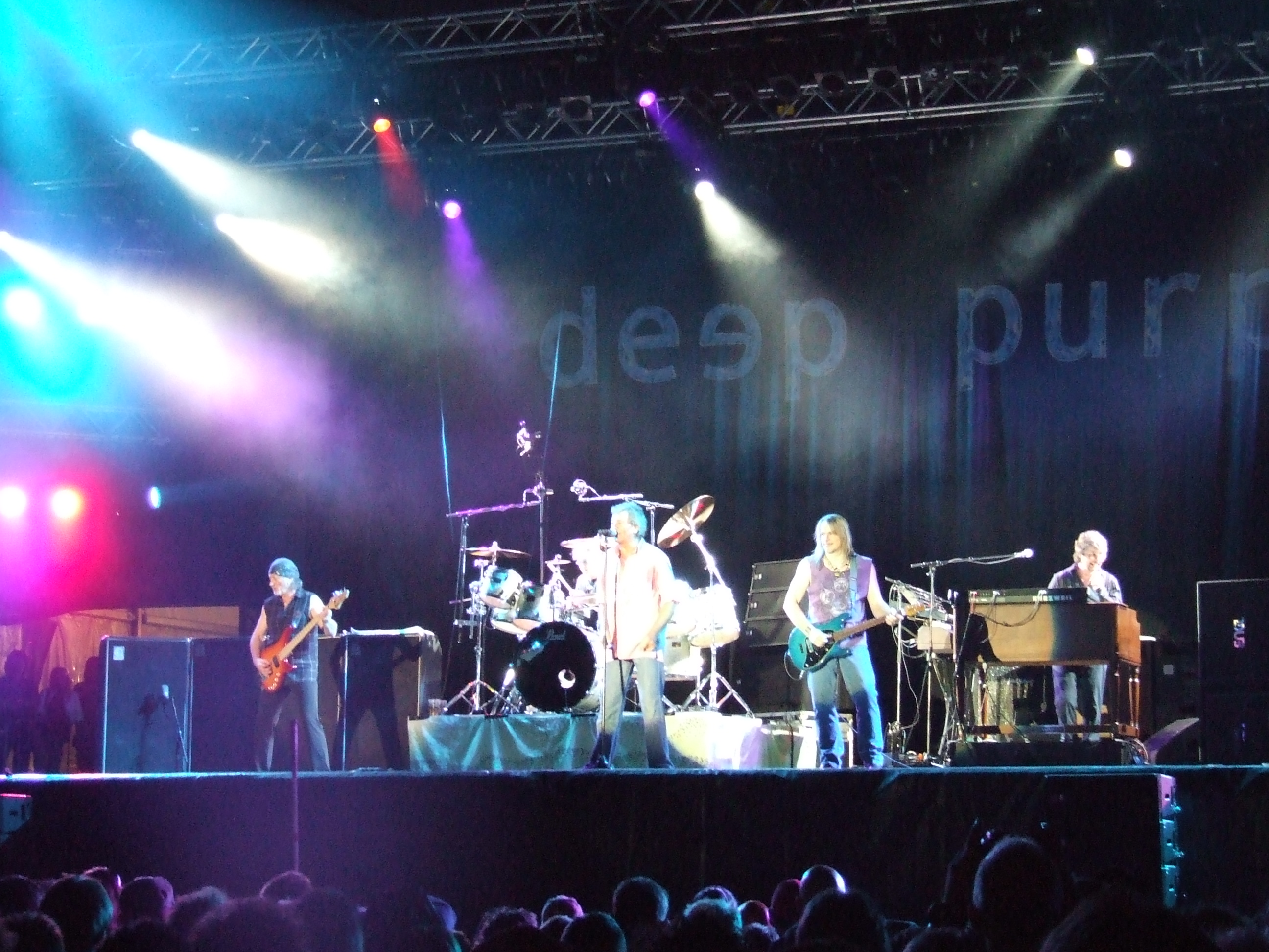 Dit is een zelfgemaakte opname, gefotografeerd op 9 juni 2006 op het Arrow Rock festival 2006 in Lichtenvoorde. De gebruikte camera is een Fuji s5600. Paulus_2 12 jun 2006 11:50 (CEST)